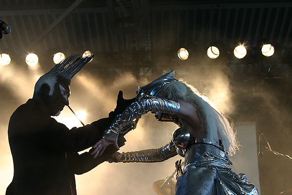 Gothminister, Konzertfoto vom Mera Luna, 2004